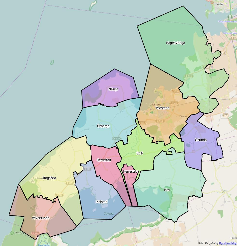 Distriktsindelningen i Vadstena kommun World file: 45.26776152292042354 0 0 -45.26776152292042354 1628601.80258116754703224 8081821.63256781548261642